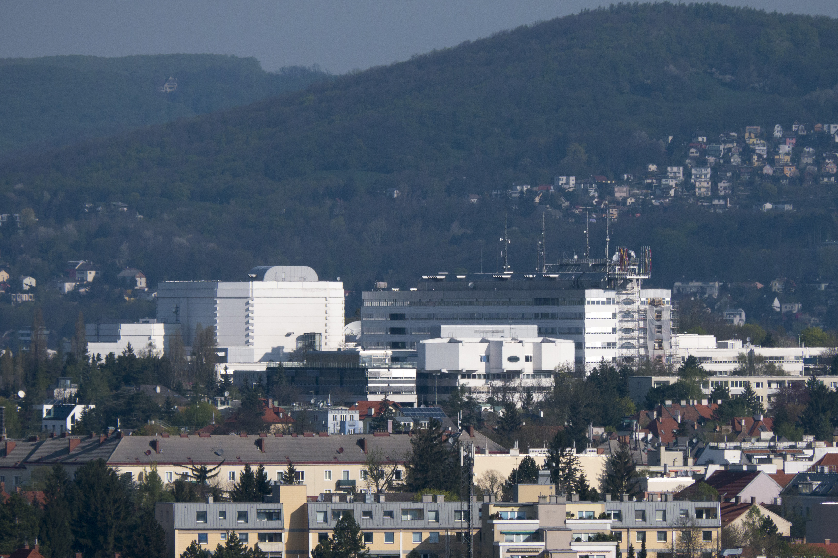 ORF Zentrum Küniglberg Wien